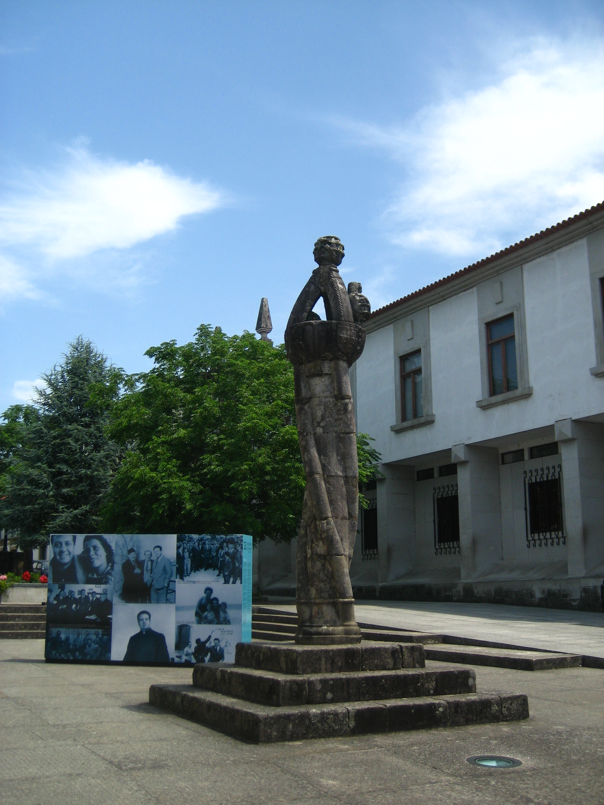 Statue Pelourinho sur la place de la mairie, Arcos de Valdevez, Portugal